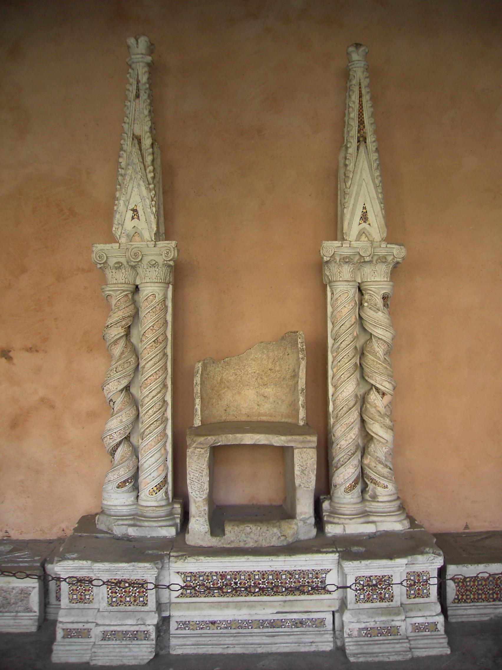 Roma, chiostro della basilica di san Giovanni: trono papale